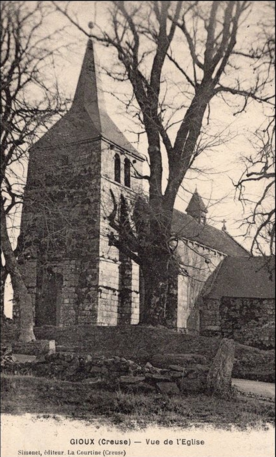 L'église.